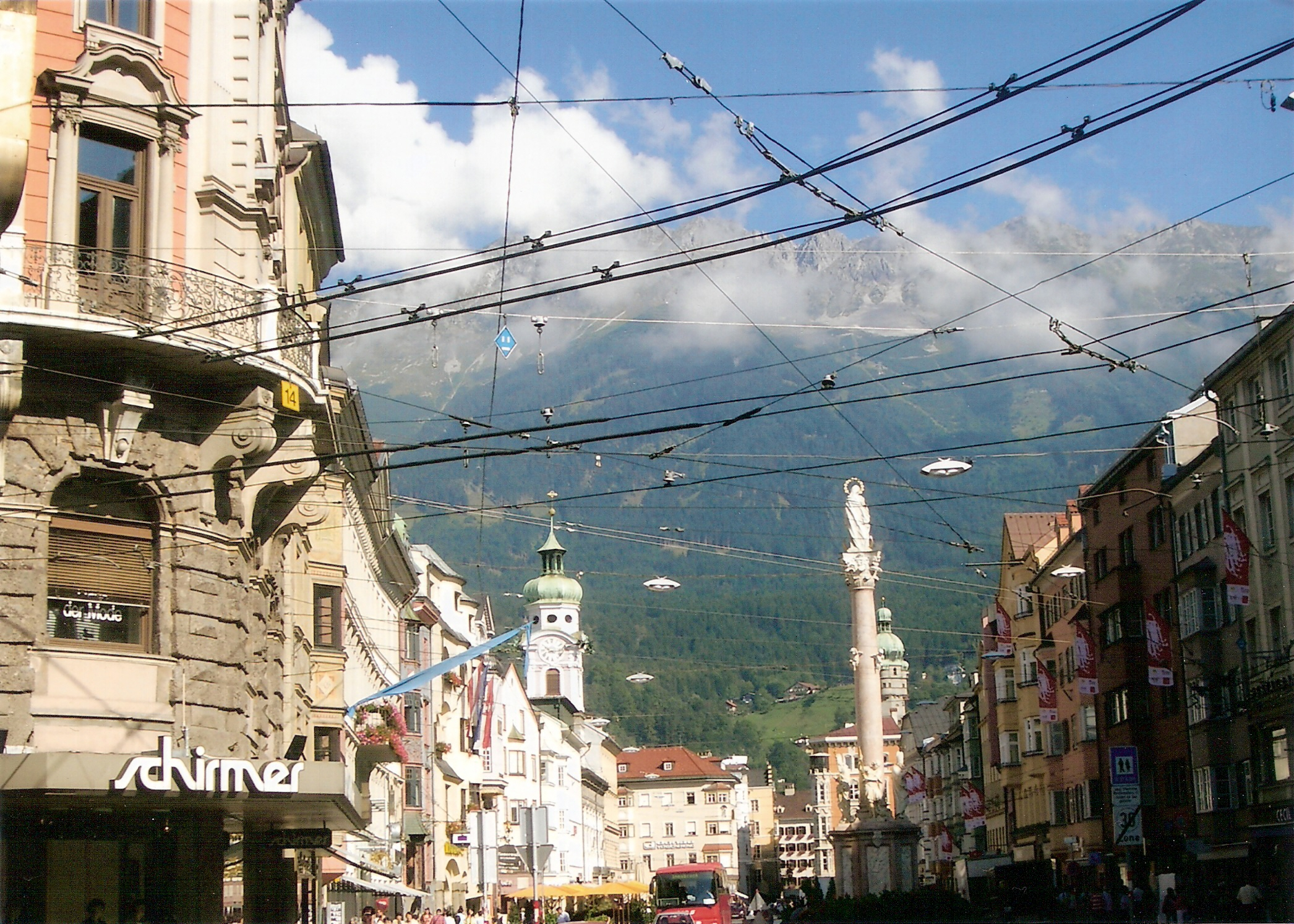 Innsbruck Tram System taken in 2005.